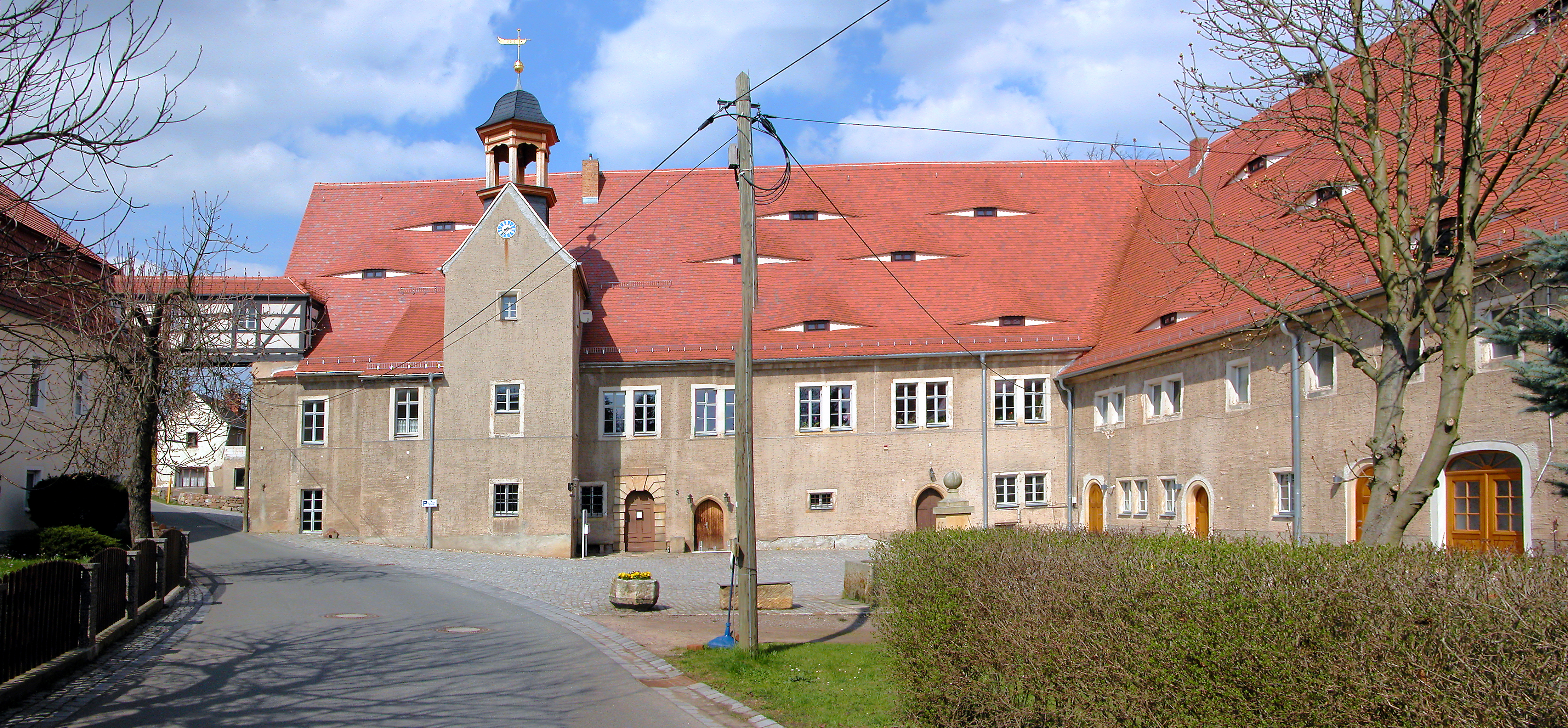 Schloss Klipphausen, um 1530 erbaut. Heute Gemeindeverwaltung. Zustand 2012.